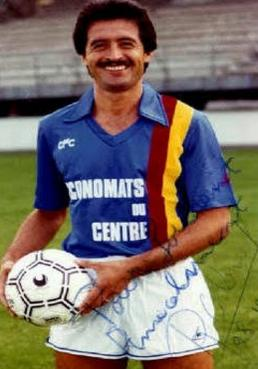 Roberto Cabral en Clermont